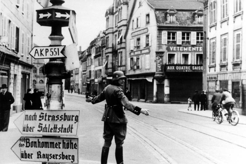 Polizei regelt den Verkehr bei Schlettstadt, Elsaß 1940 Information added by Wikimedia users.